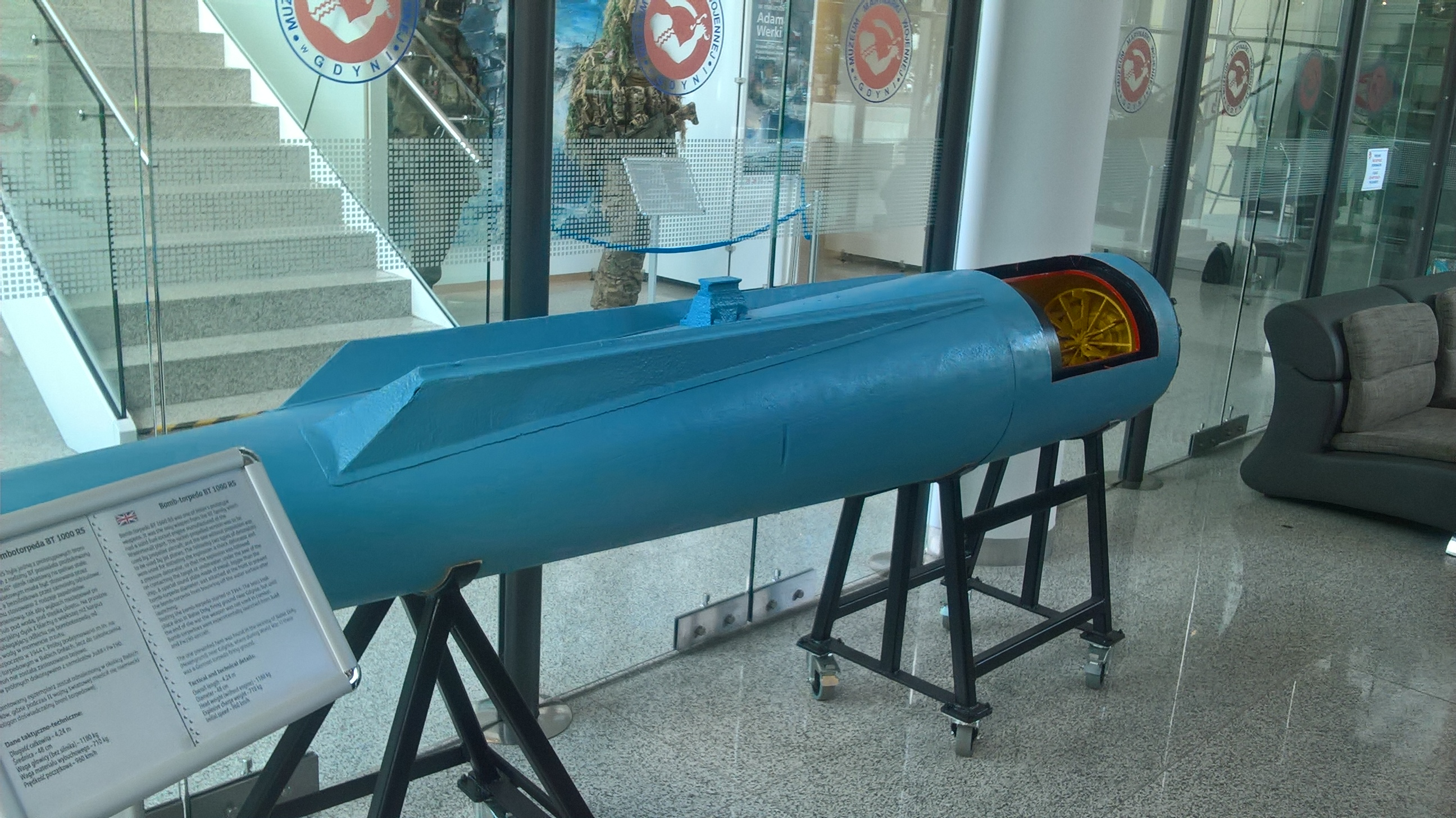 Eksperymentalna niemiecka bombotorpeda BT 1000 RS eksponowana w Muzeum Marynarki Wojennej w Gdyni.